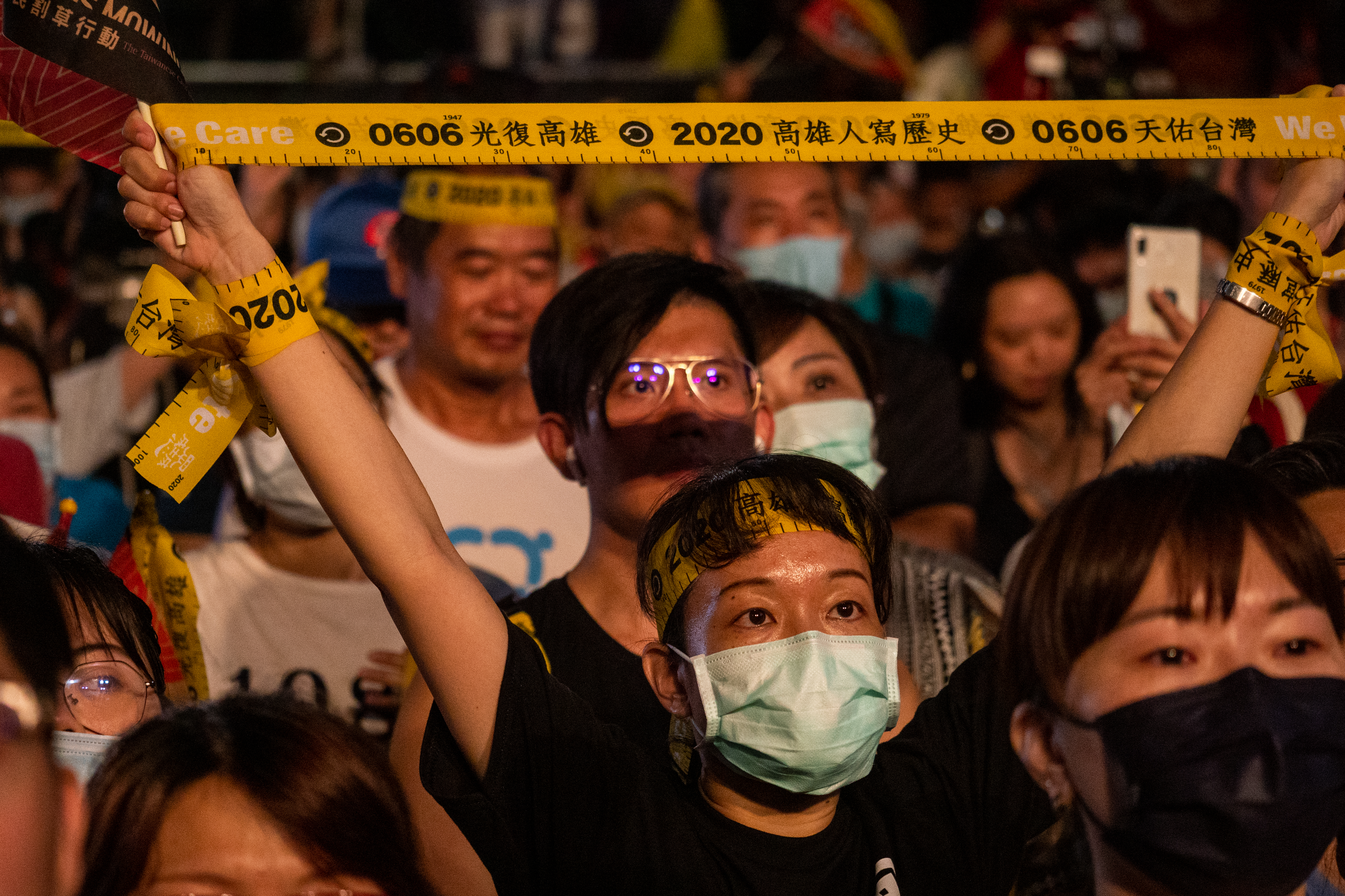 中文（台灣）: 罷韓投票日罷免總部現場